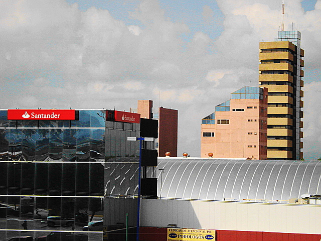 Edificios de la zona Tangamanga en San Luis Potosí, México.